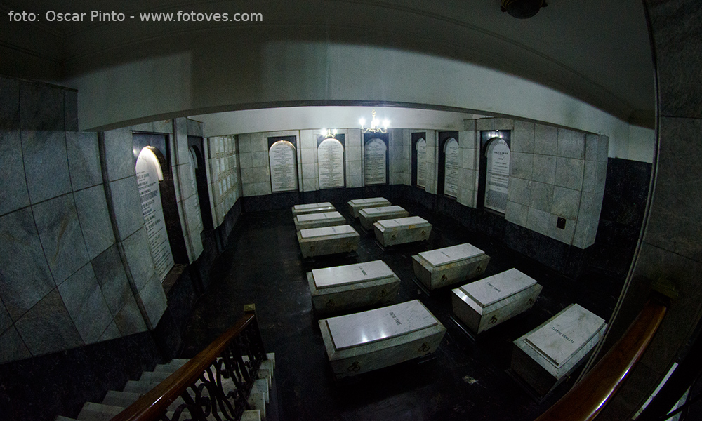 Interior de la Cripta de los heroes en el Cementerio Presbitero Matías Maestro